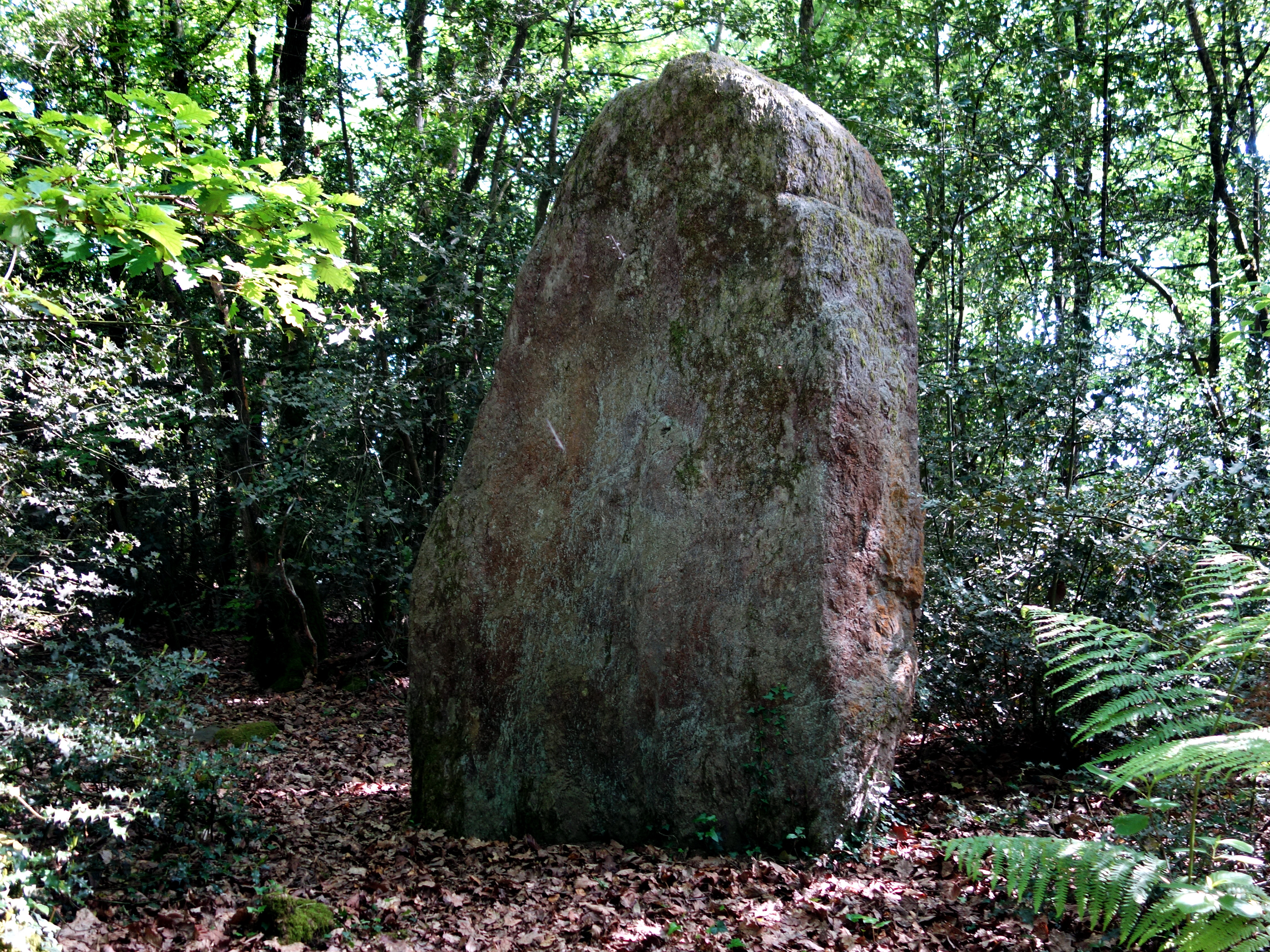 D'une forme assez régulière, il mesure 2,80 mètres de haut pour 1,60 m de large à la base et 0,80 m à son sommet. On peut voir une seconde pierre couchée à quelques mètres de lui vers le nord.